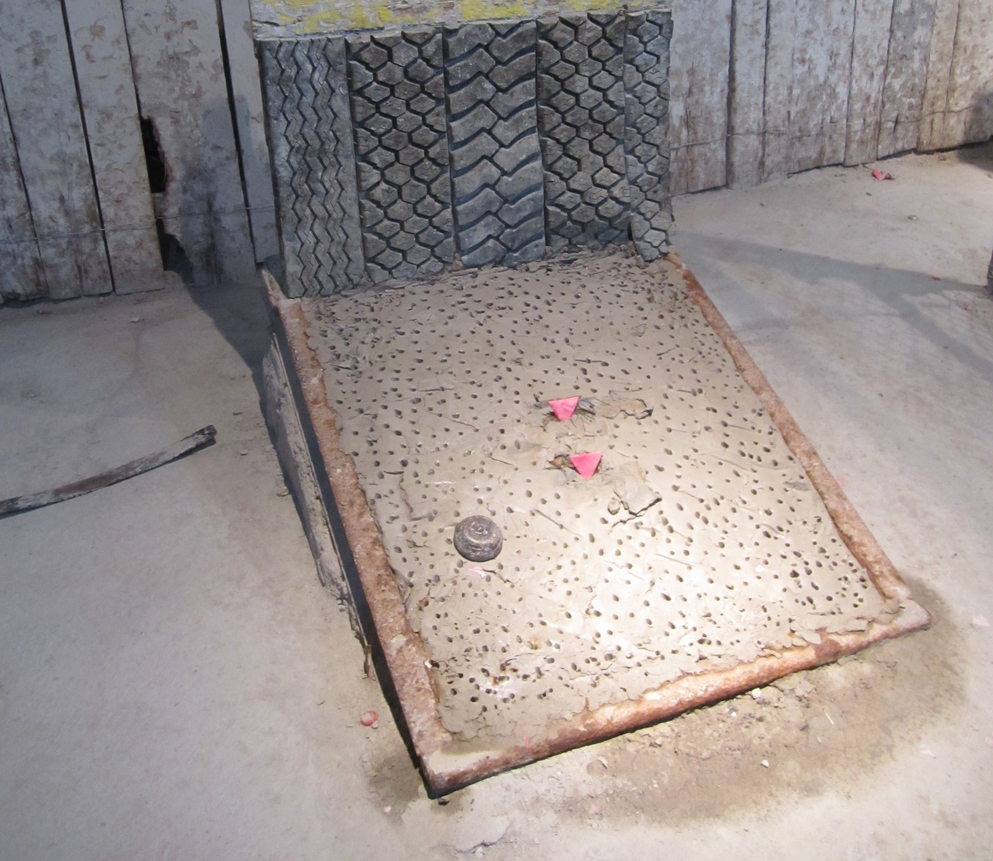 Tejo